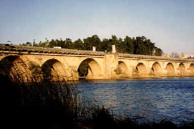 Levantado sobre otro anterior datado en 1460, y destruido por una fuerte crecida del río en 1545, el puente actual fue concluido en 1596, siendo el rey de España Felipe II, y Gobernador de Badajoz D. Diego Hurtado de Mendoza. Hasta el construido en el siglo XV, la ciudad careció de puente, realizándose la travesía del río mediante barcas, o aprovechando los vados en tiempo practicable. El erigido a finales del XVI, es básicamente, el mismo llegado hasta nuestros días, tratándose de una obra de carácter herreriano, sólidamente fabricado en piedra. Distintos desperfectos ocasionados por el río en diferentes épocas han obligado, no obstante, a sucesivas reparaciones para mantenerlo practicable. Así en 1603, reinando ya Felipe III, una gran crecida del Guadiana destruyó 16 de sus 24 ojos, motivando su práctica reconstrucción.